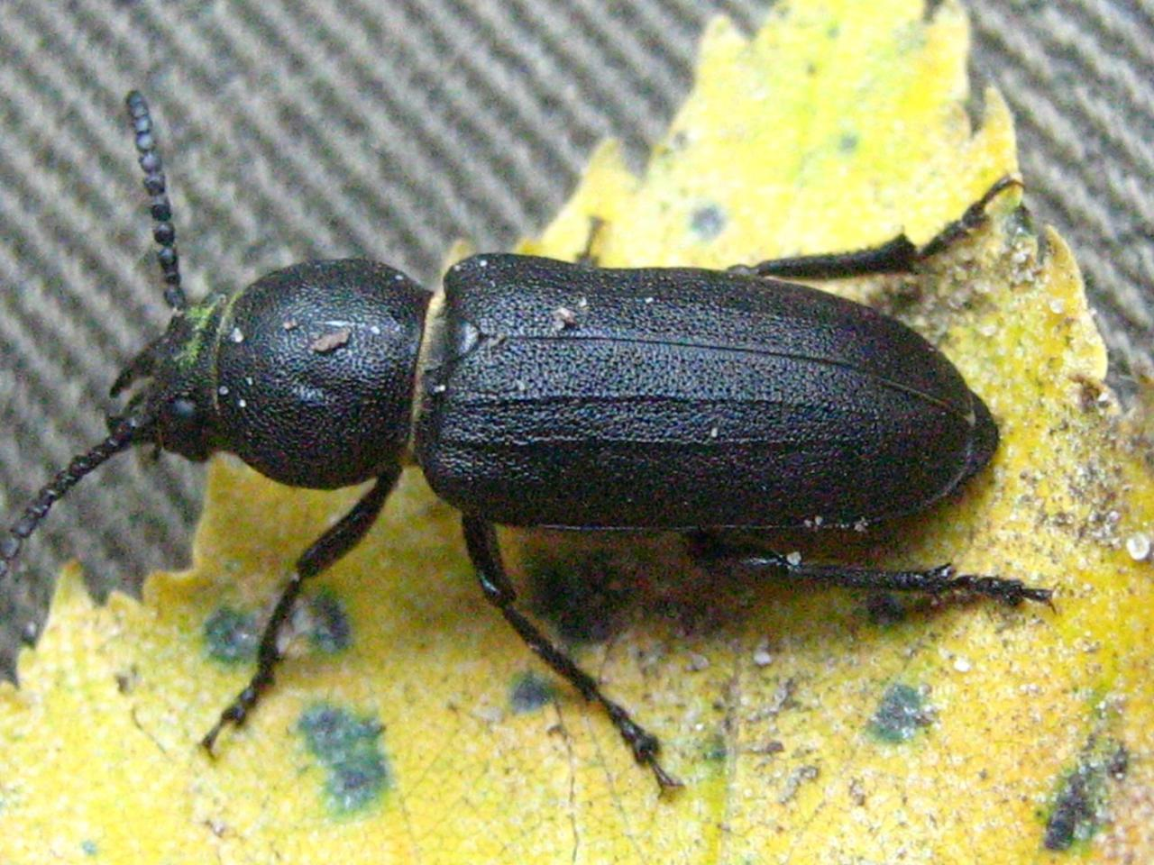 Der Waldbock, Spondylis buprestoides L., gefunden und fotografiert im Stadtwald Nauen (Brandenburg, Germany)